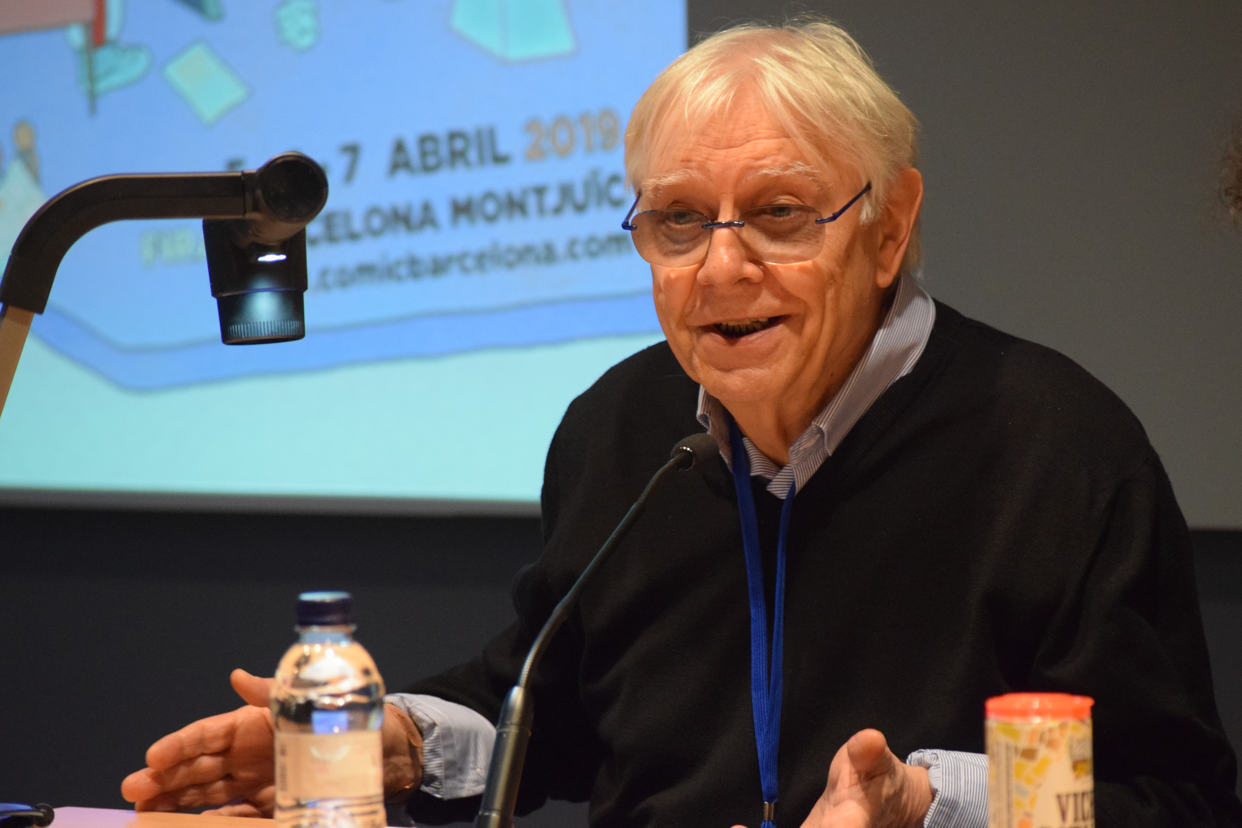 El dibuixant italià Milo Manara en una classe magistral sobre còmic durant el 37 Còmic Barcelona, 2019.